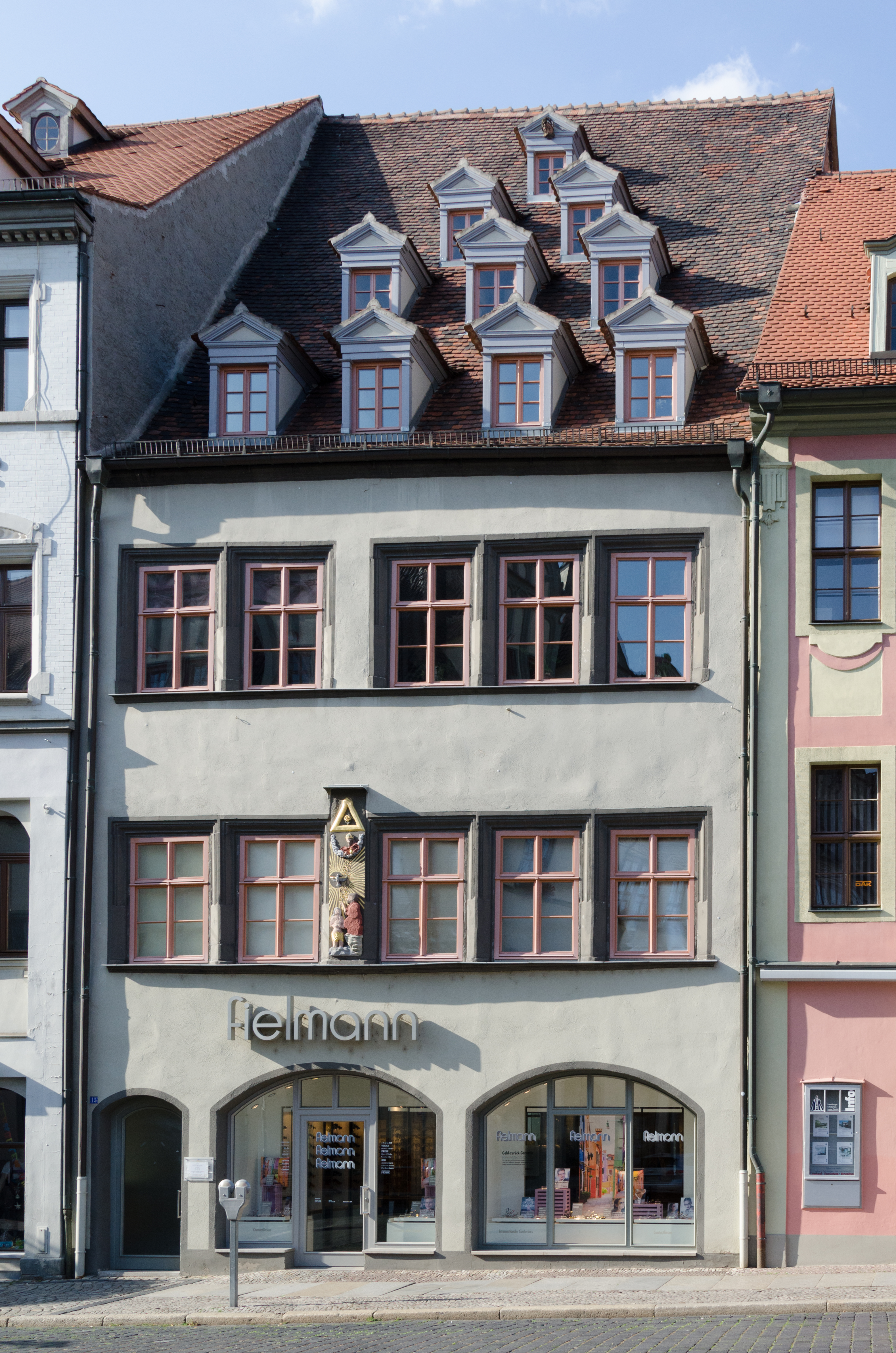 Naumburg, Markt 15